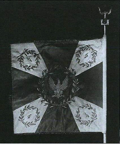 lewa strona sztandaru 4 psap